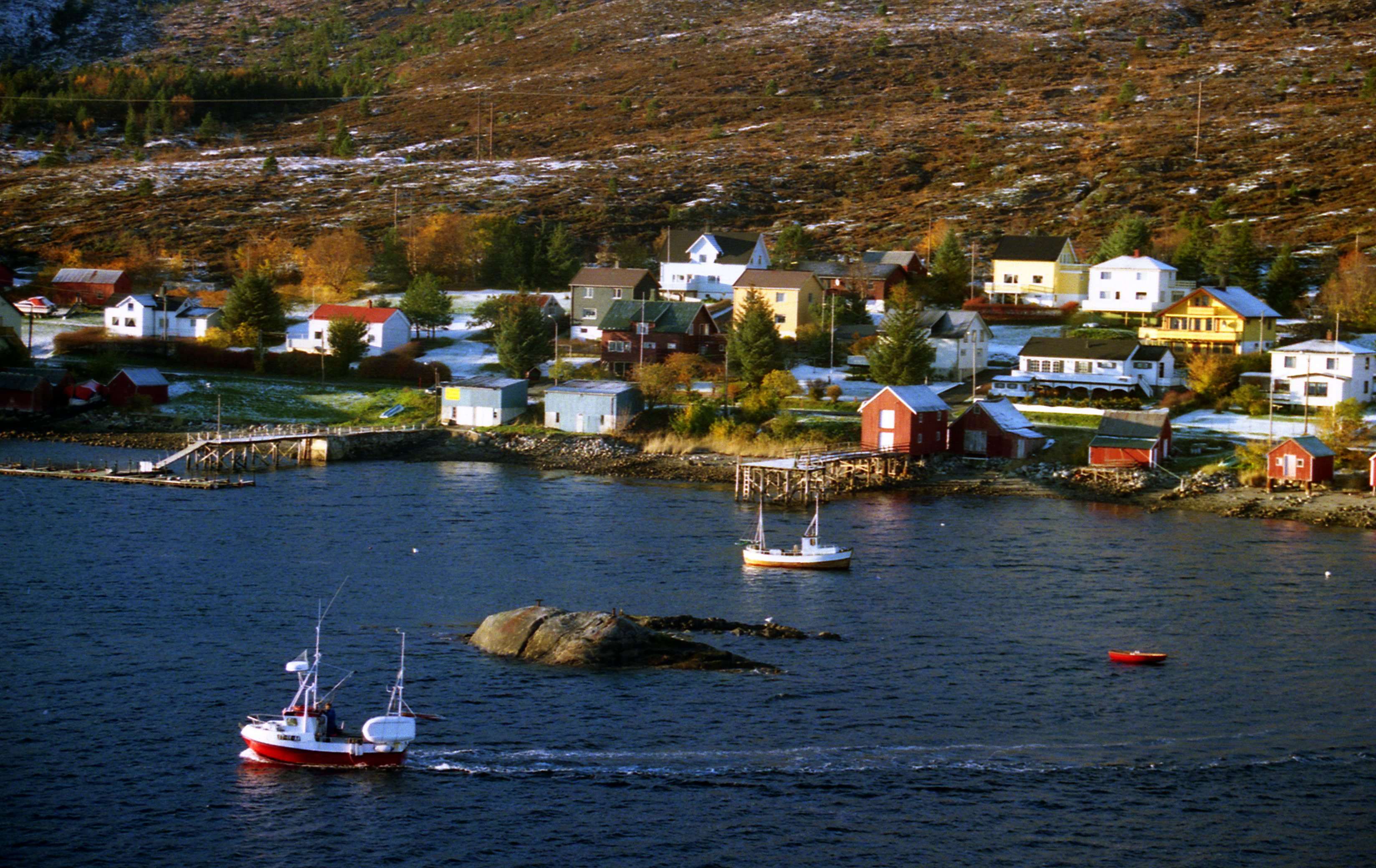 Ort Harsvika im Stokksund, Region Sør-Trøndelag (Norwegen)